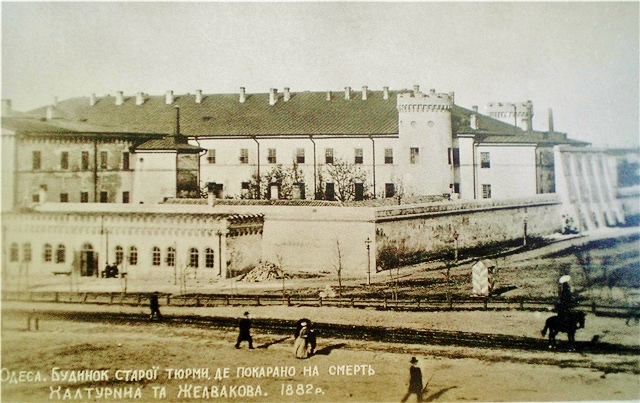 Prigione di Odessa. XIX secolo